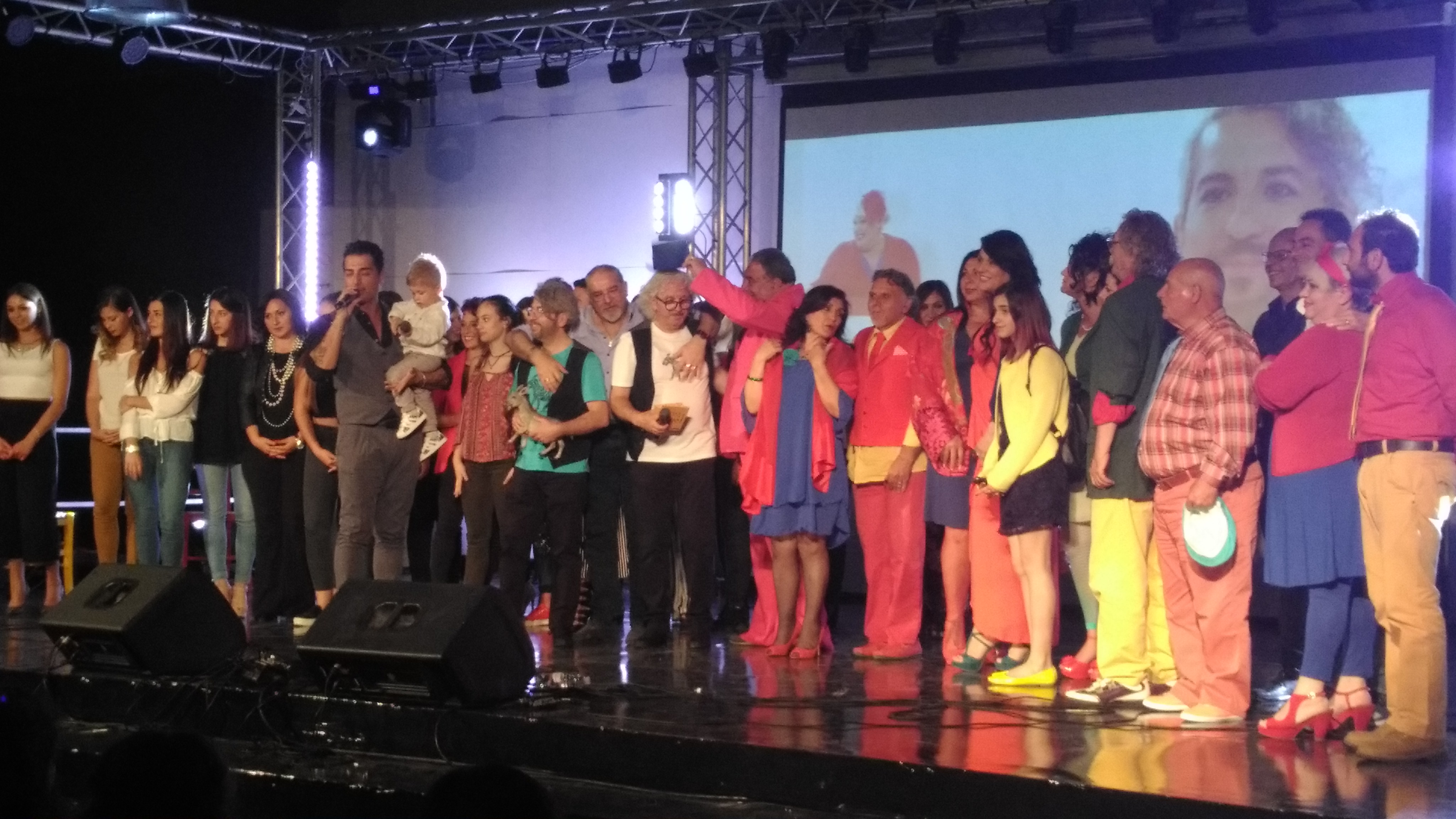 Cast del Videoclip "Taranta di lu spicchiu"